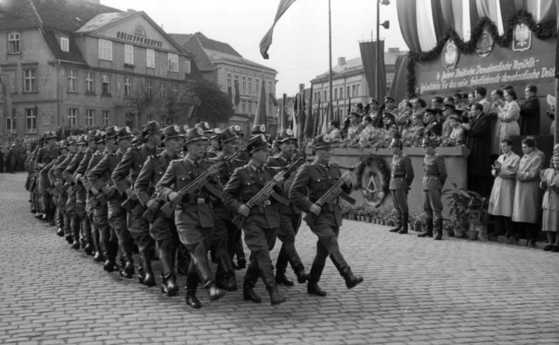 Zentralbild/Löwe Zum Tag der Republik Am 7.10.1955, dem 6. Jahrestag der DDR demonstrierte die Bevölkerung von Neustrelitz zu einer Kundgebung auf dem Marktplatz in Neustrelitz. UBz: Vorbeimarsch der Deutschen Volkspolizei.